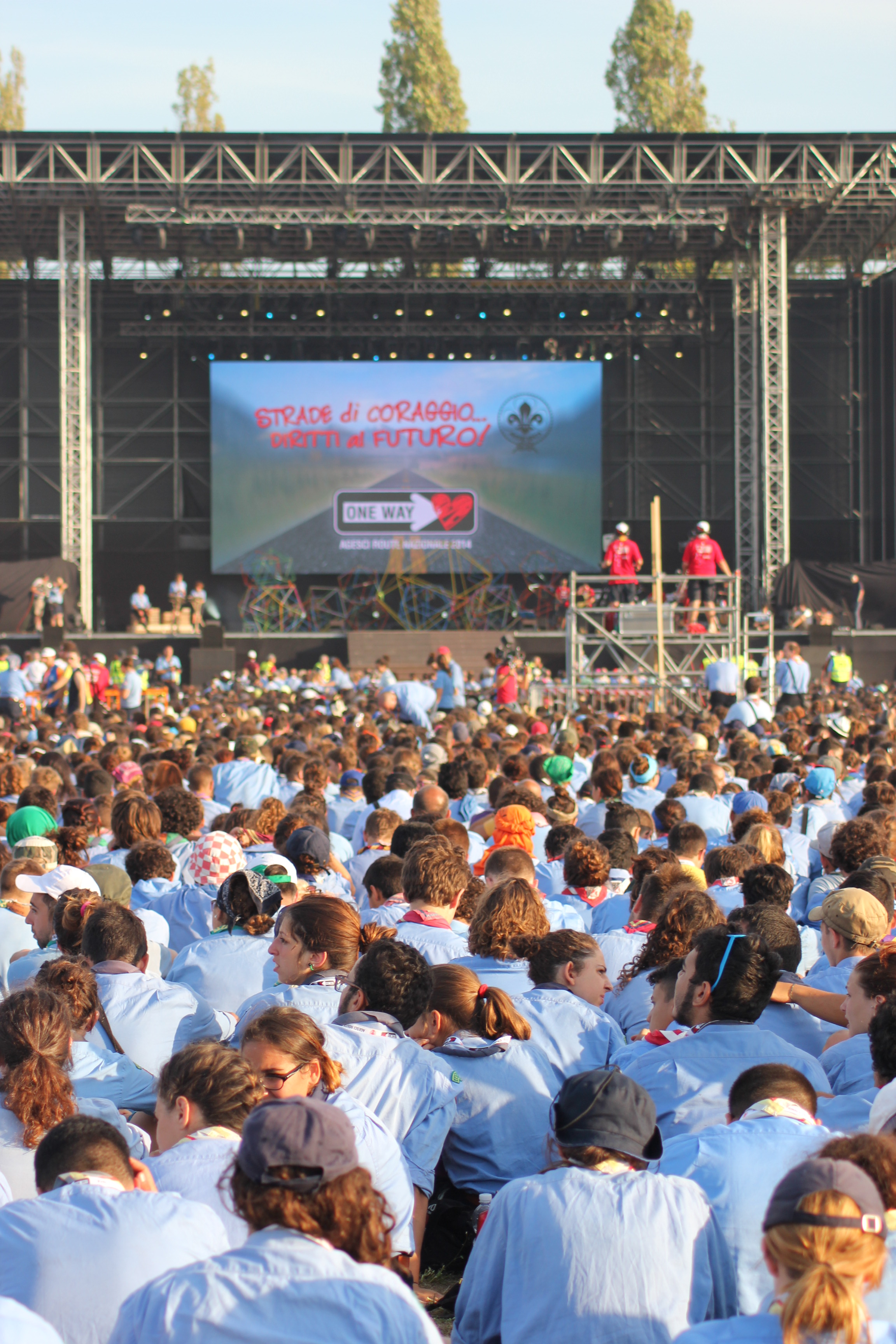 San Rossore, Cerimonia di apertura